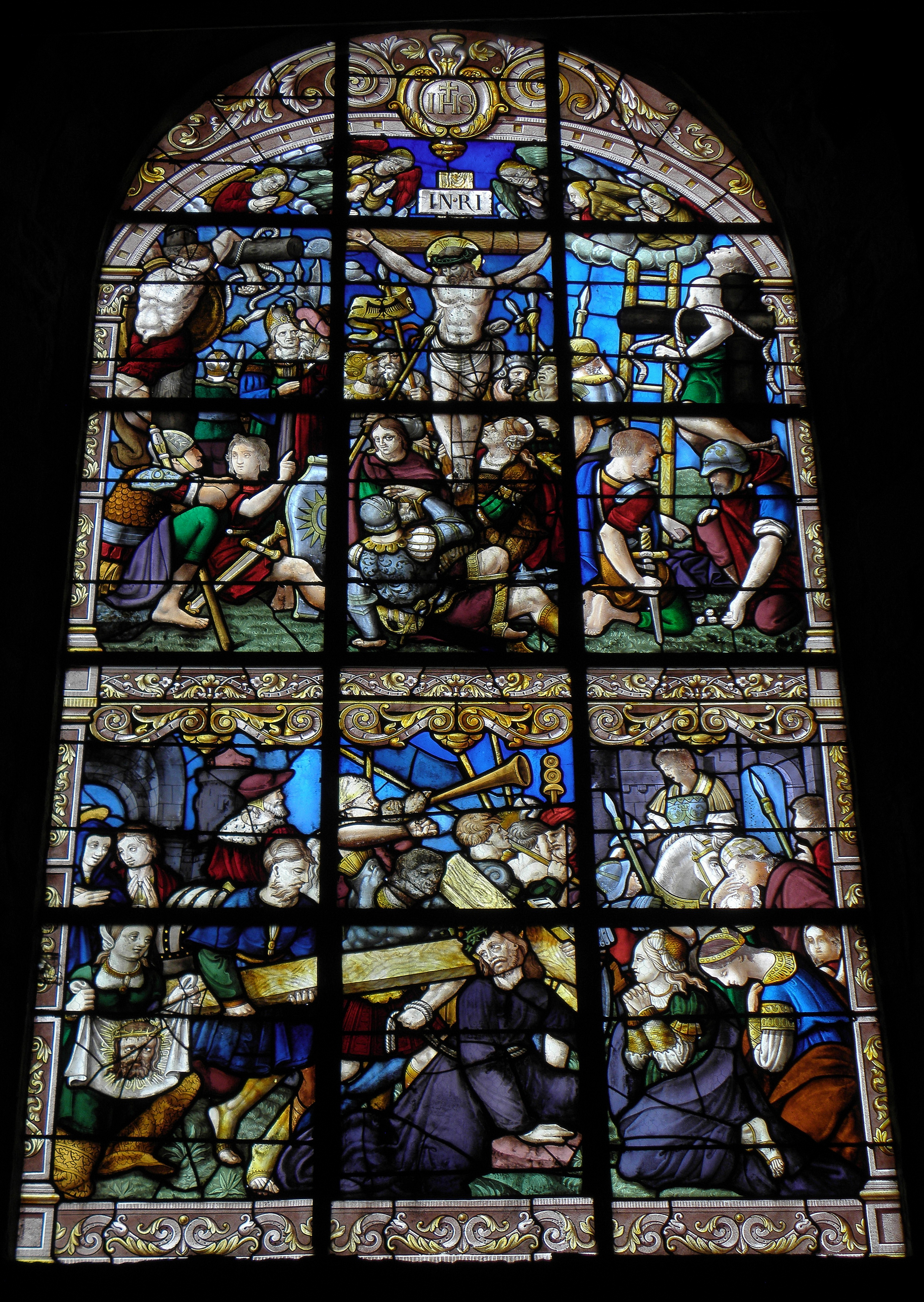 Vitrail de la Passion de l'église Saint-Pierre de Visseiche (35).